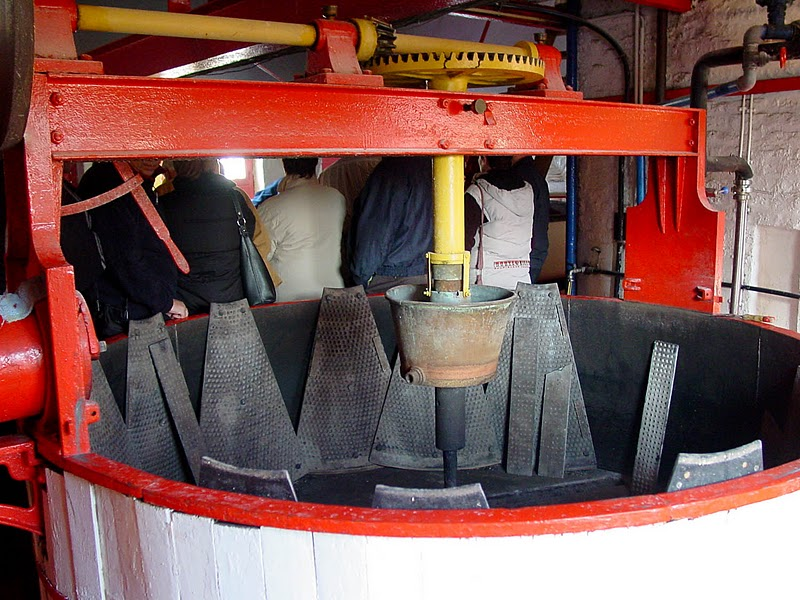 Brouwketel